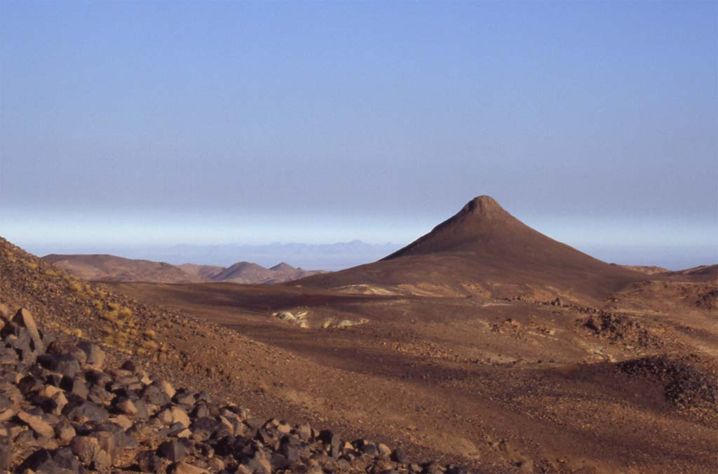 Le mont Tahat (3003 m) au sud ouest du Massif du Hoggar, sud de l'Algérie